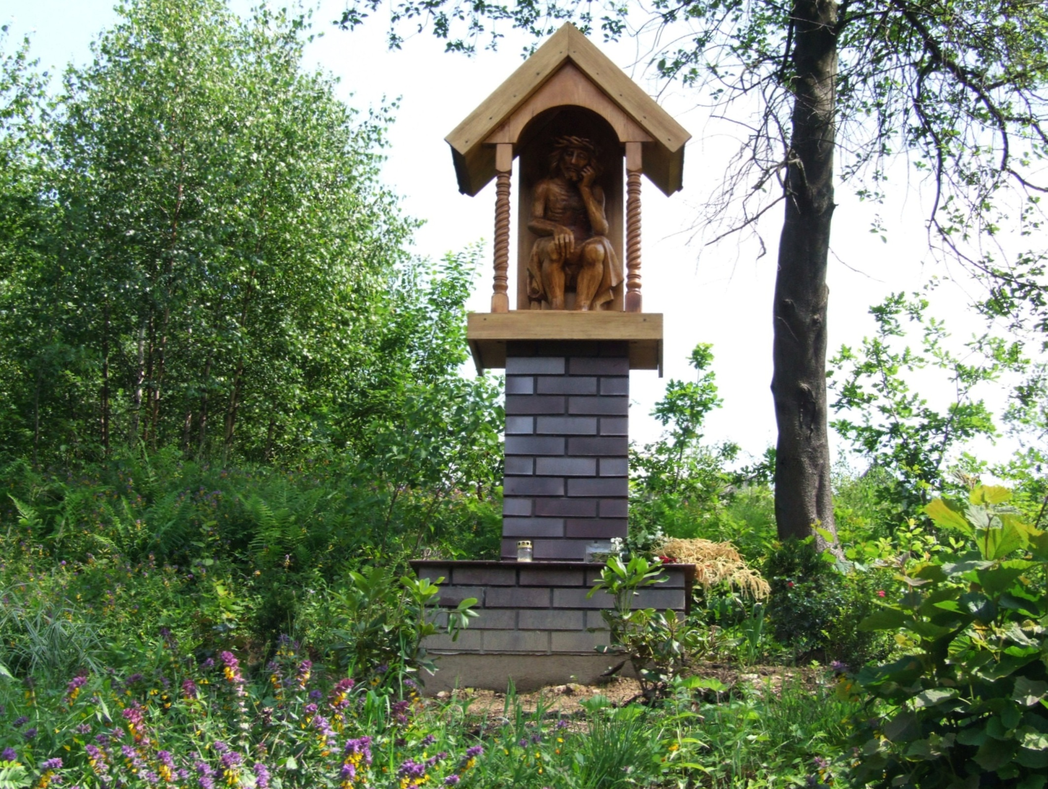 Kapliczka w Porębie (województwo małopolskie), przy szlaku turystycznym na stokach Łysiny